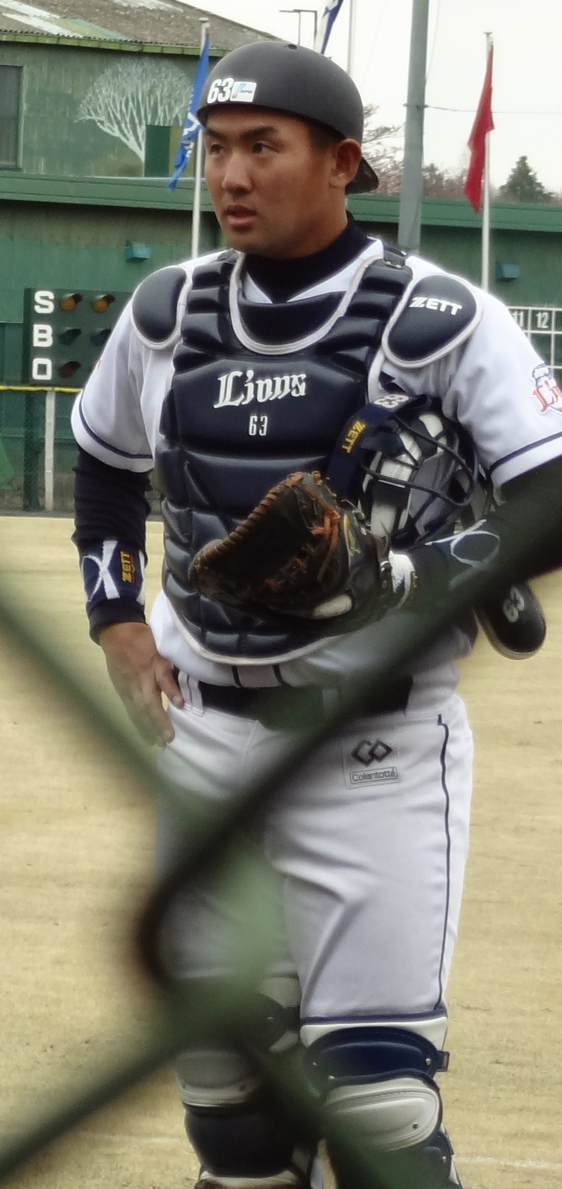 西武第二球場